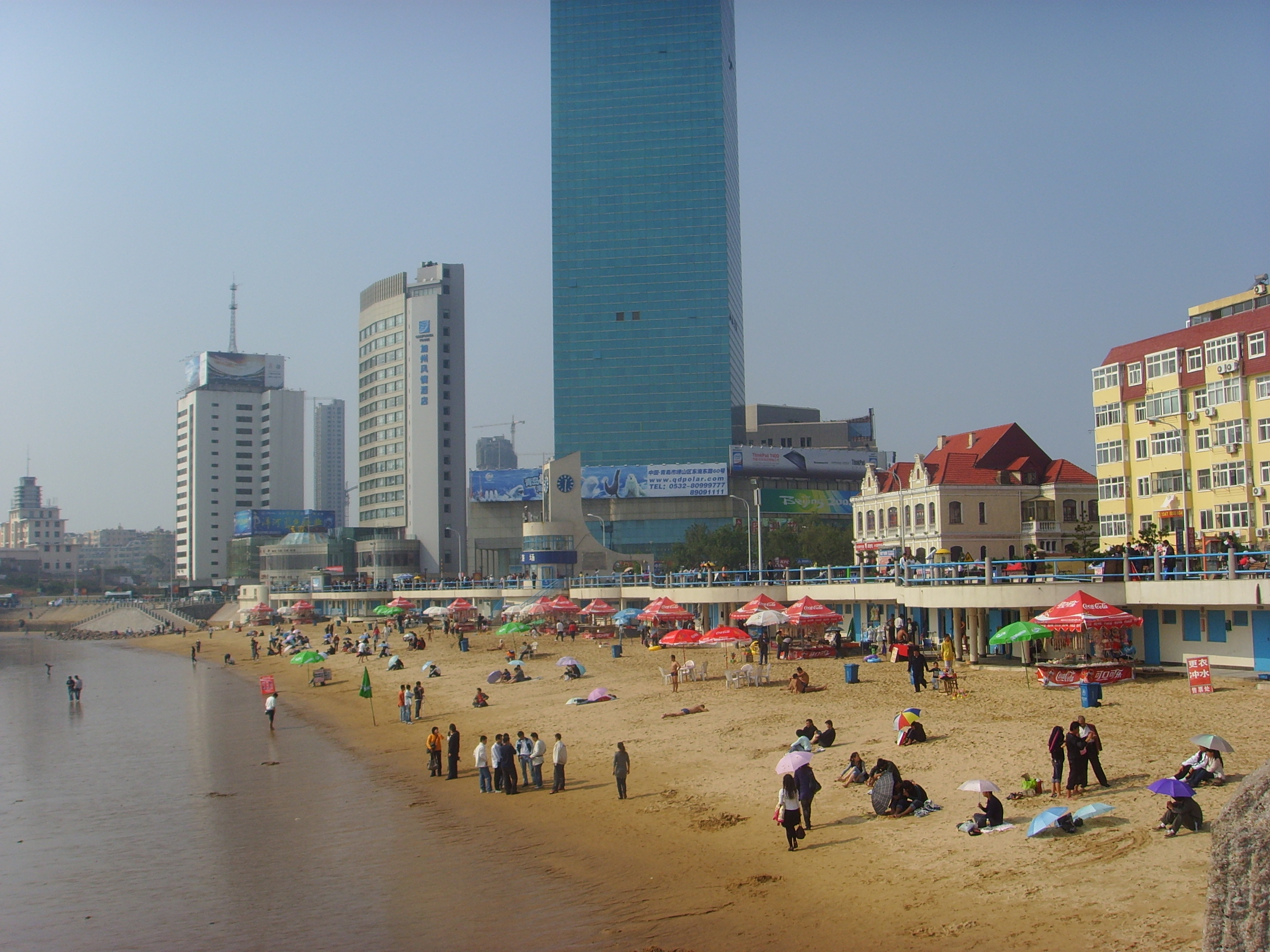 青岛湾海水浴场